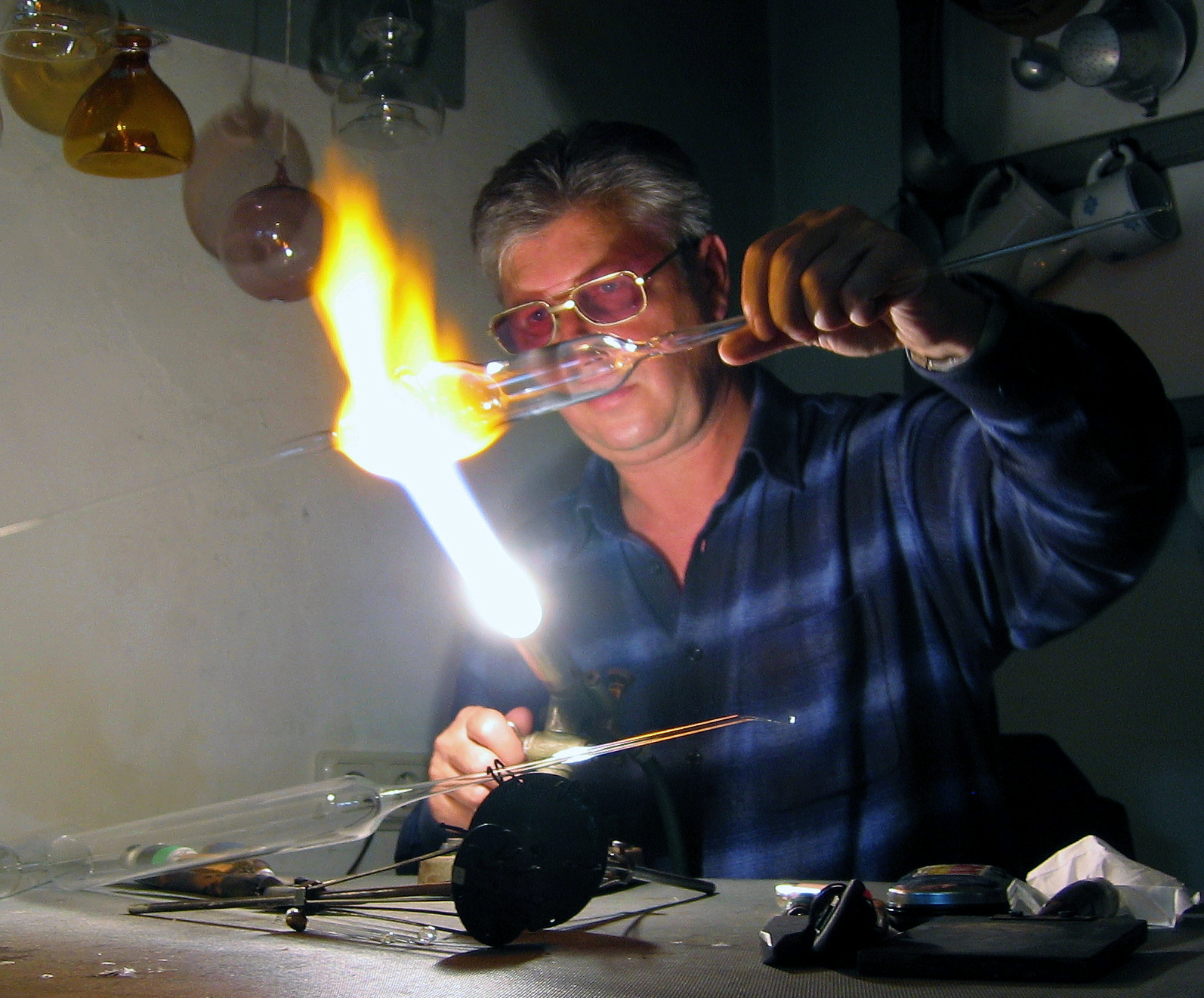 Glashüttenmuseum des Erzgebirges Neuhausen/Erzgeb.